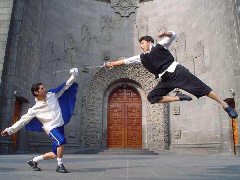 Esgrima Escénica Ejemplo 1